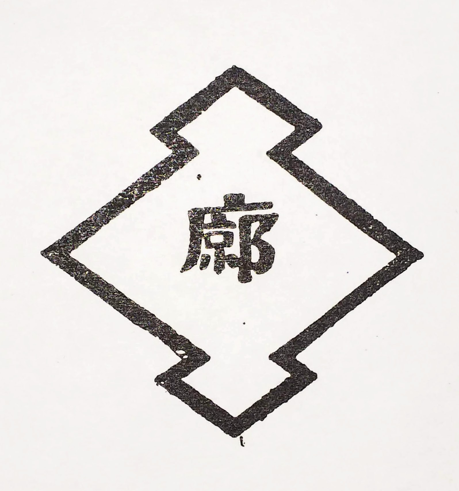 松島遊廓（新地）紋章